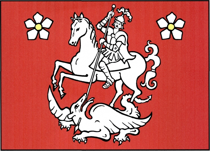 vlajka, Litobratřice, okres Znojmo